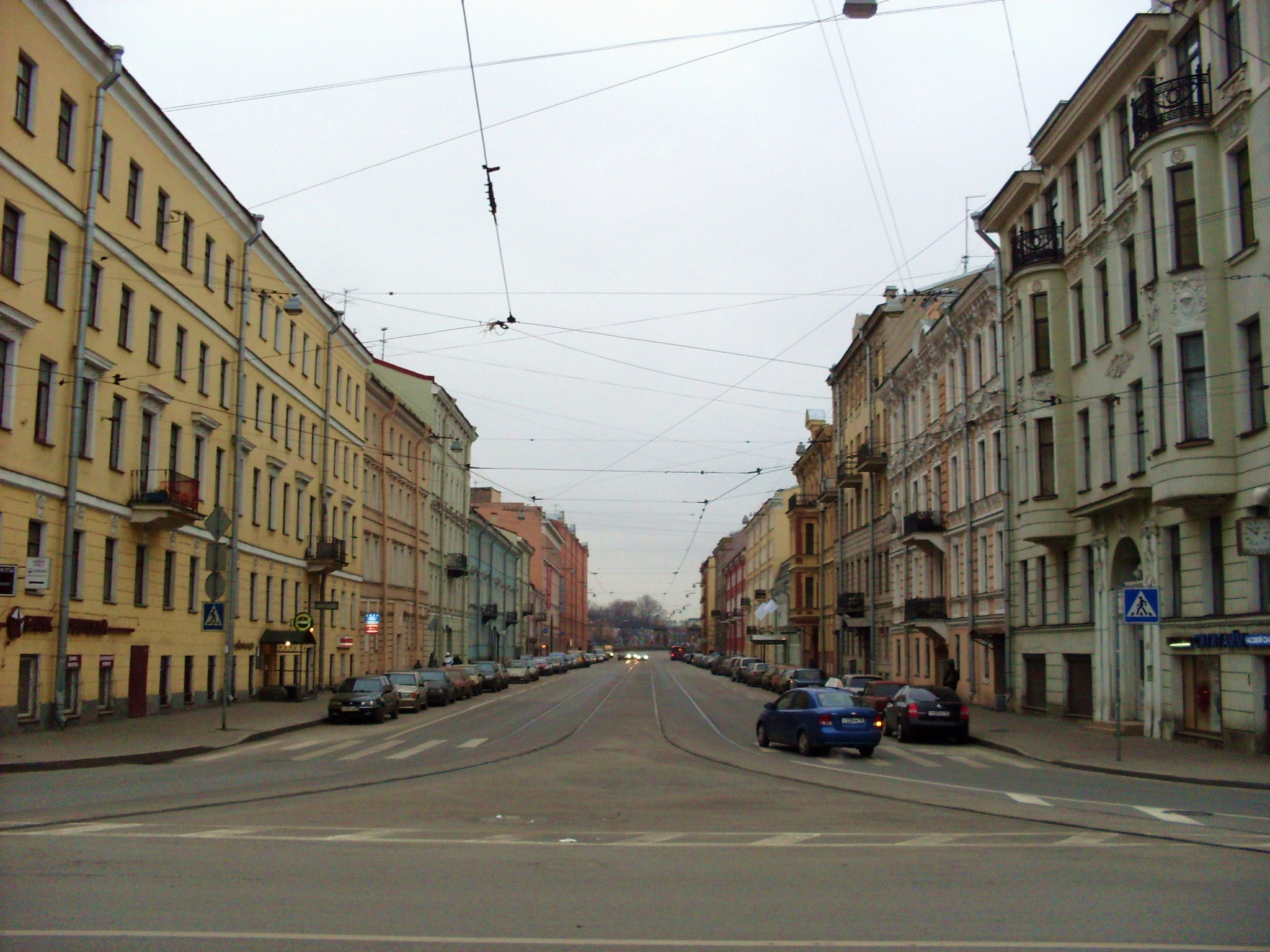 Садовая улица, Петербург